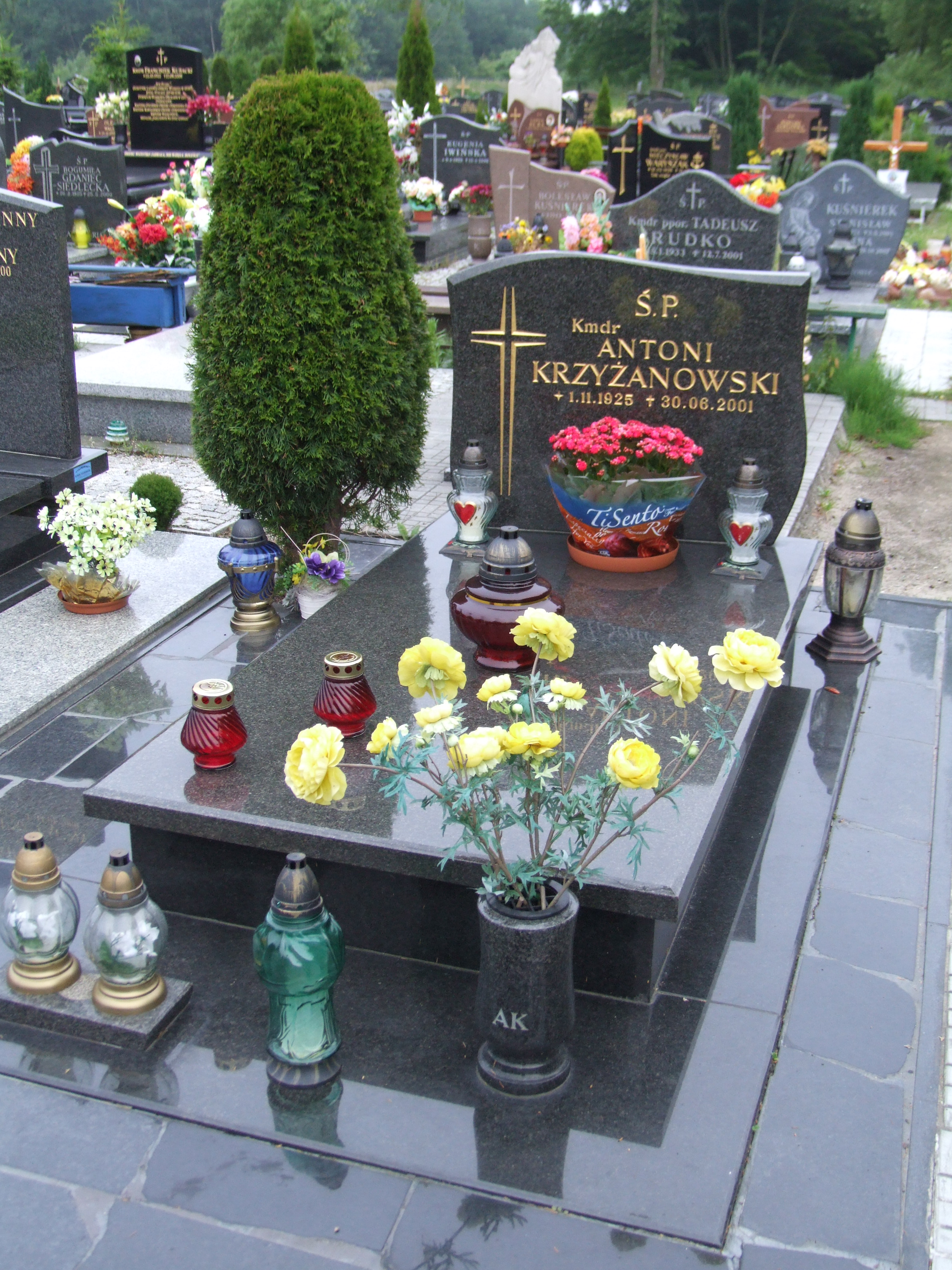 Gdynia-Oksywie Cmentarz Marynarki Wojennej